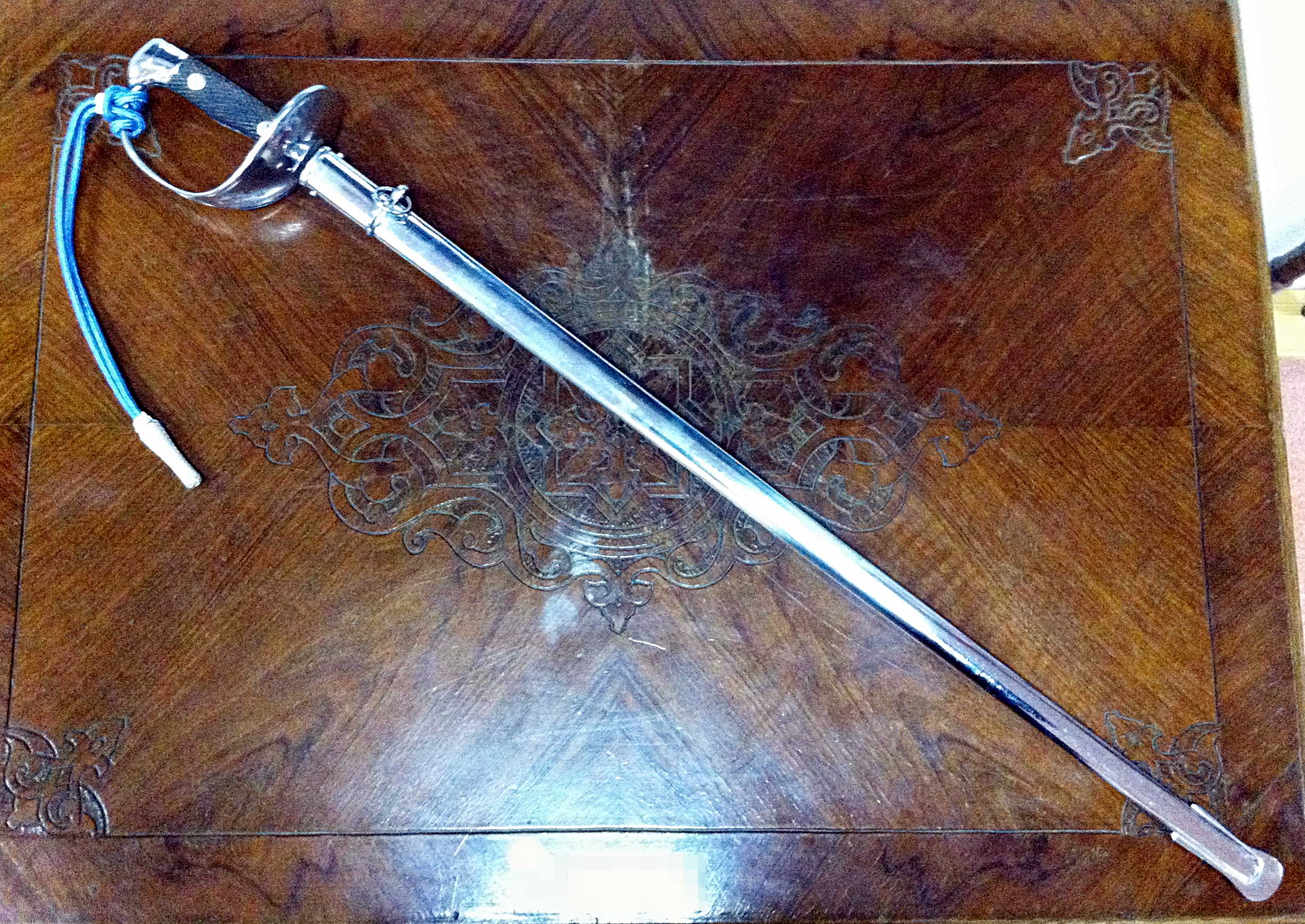 Sable PUSE modelo 1907/1918